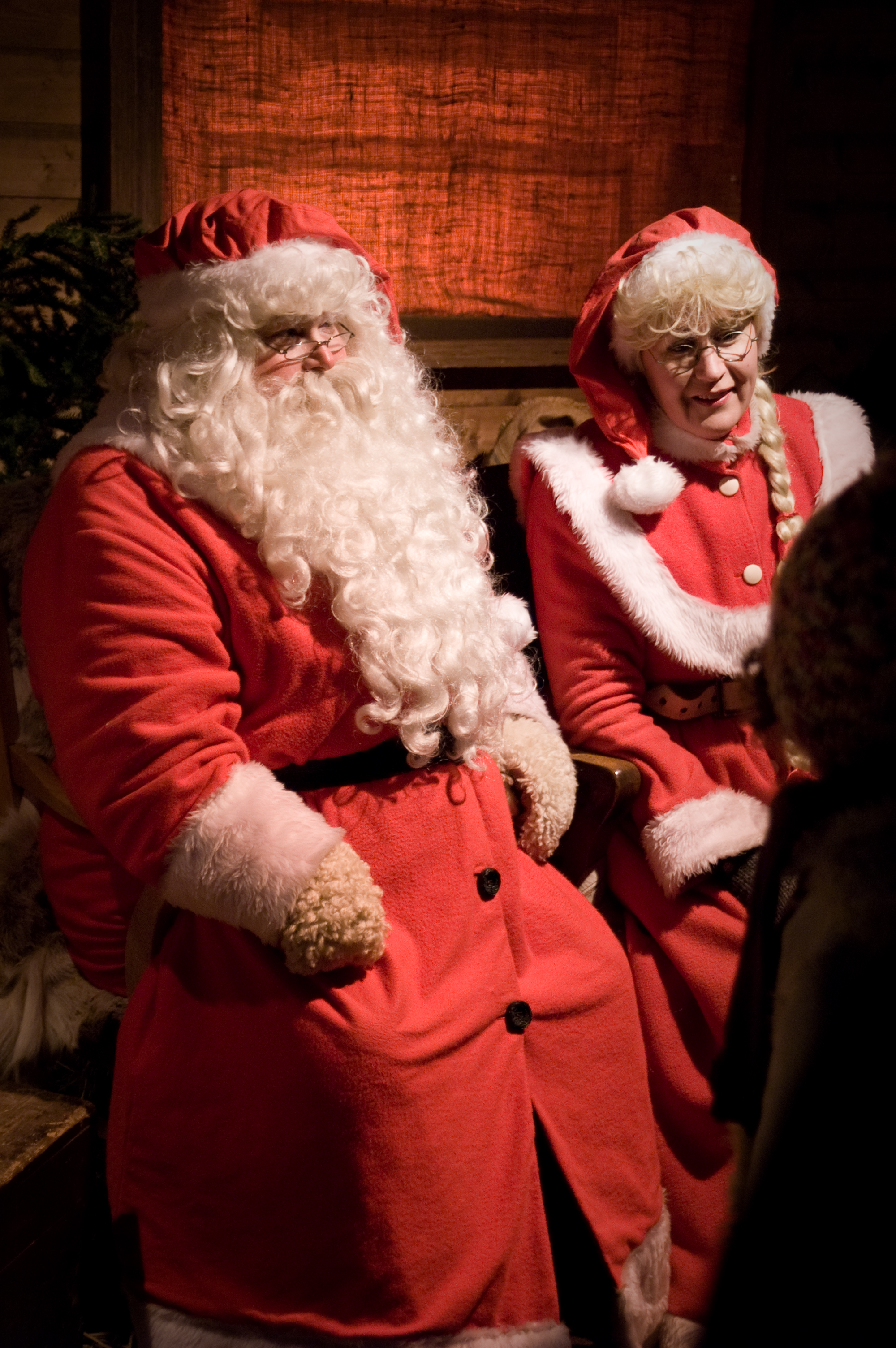 Joulupukki ja muori